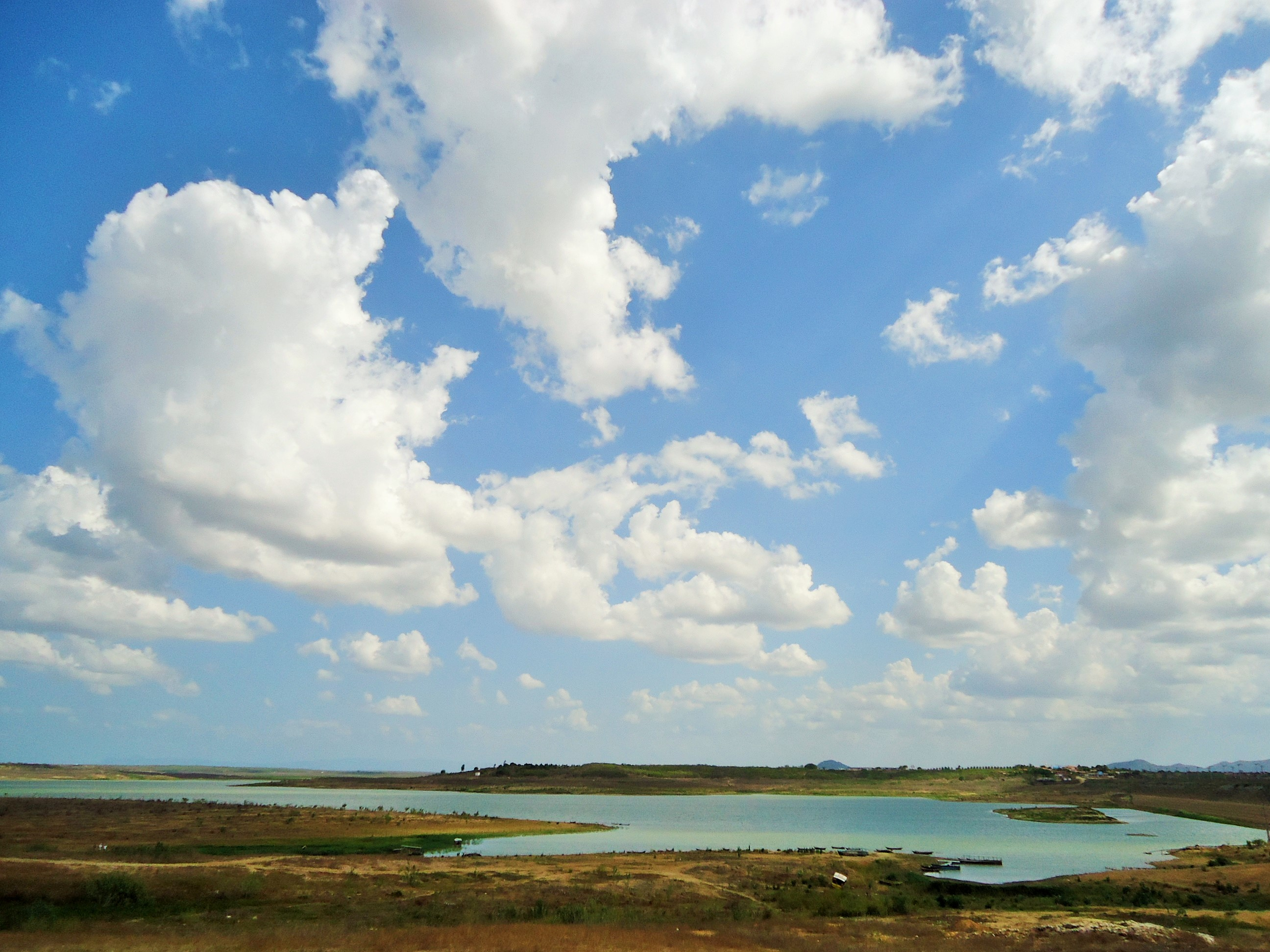 Português do Brasil: Açude Pereira de Miranda (Pentecoste, Ceará, Brasil), em fevereiro de 2015, com apenas 1% de água em relação a sua capacidade total de armazenamento, compondo assim um dos retratos da seca que se instalava no Estado, assim como em outros estados da região Nordeste e em outras regiões do Brasil.